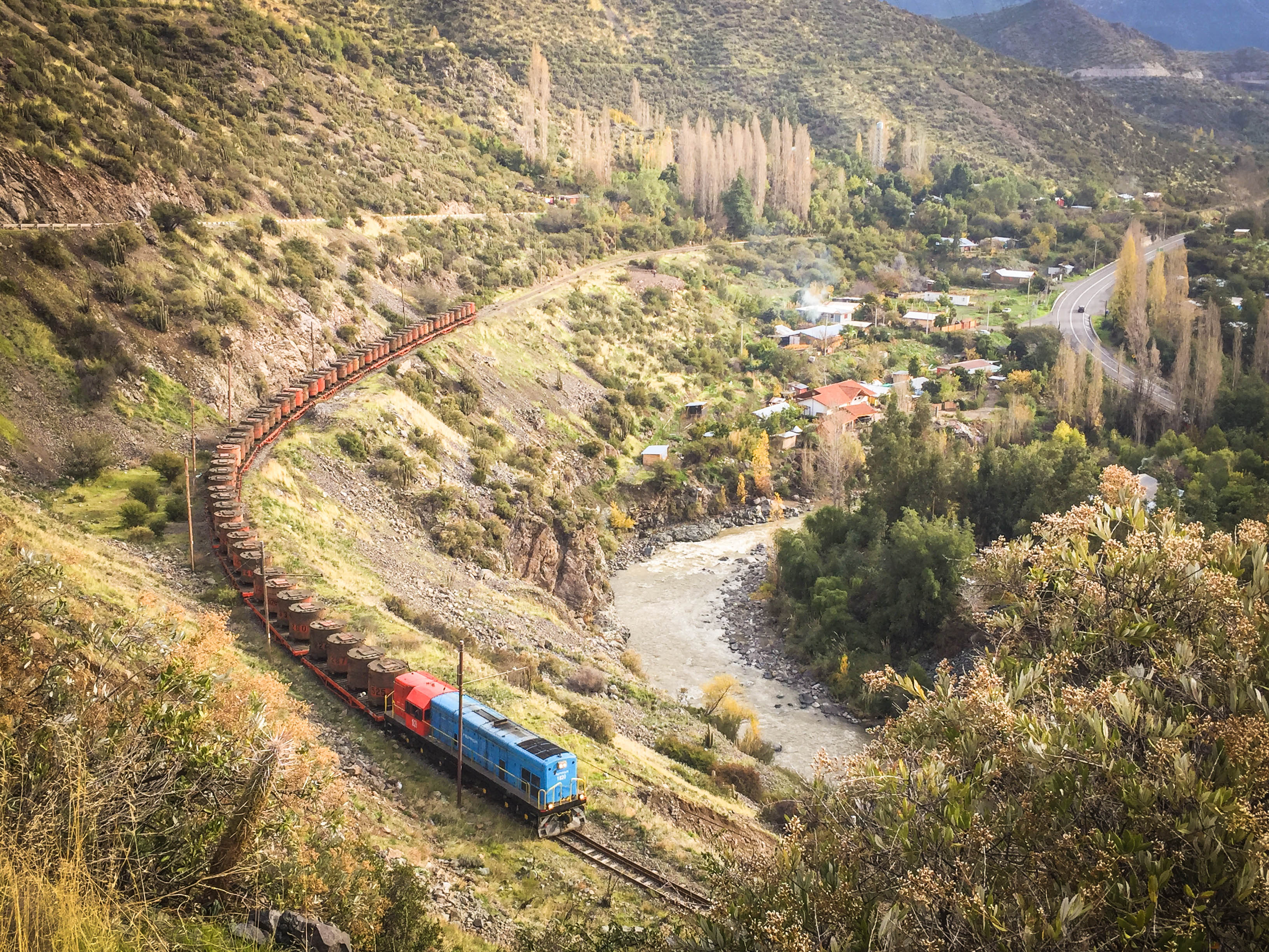 otra de las excelentes postales que nos deja el Trasandino…bah! dio el Andino…corriendo por el ex- Transandino… D1820 pisando huevos rumbo a Saladillo. P.D.: Segui al comercial que decía. "tomada con Iphone 6" ja!